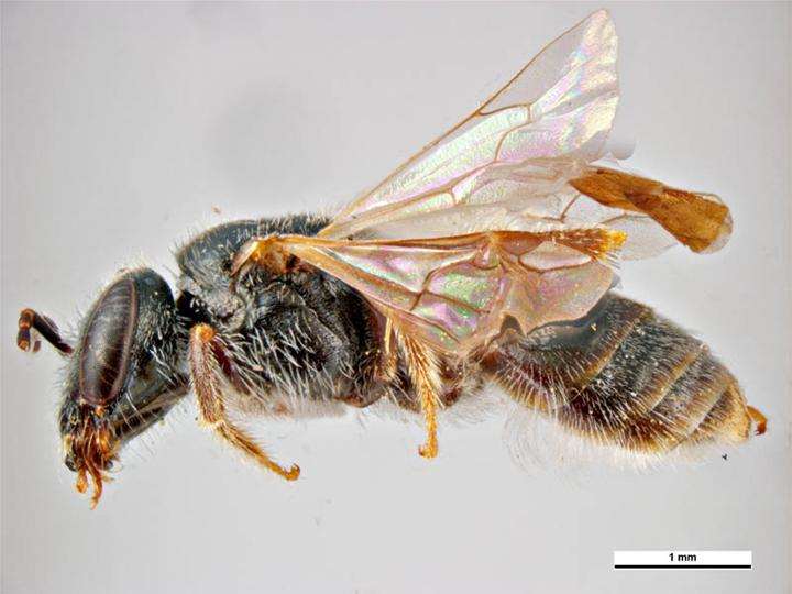 Lasioglossum cephalochilum female